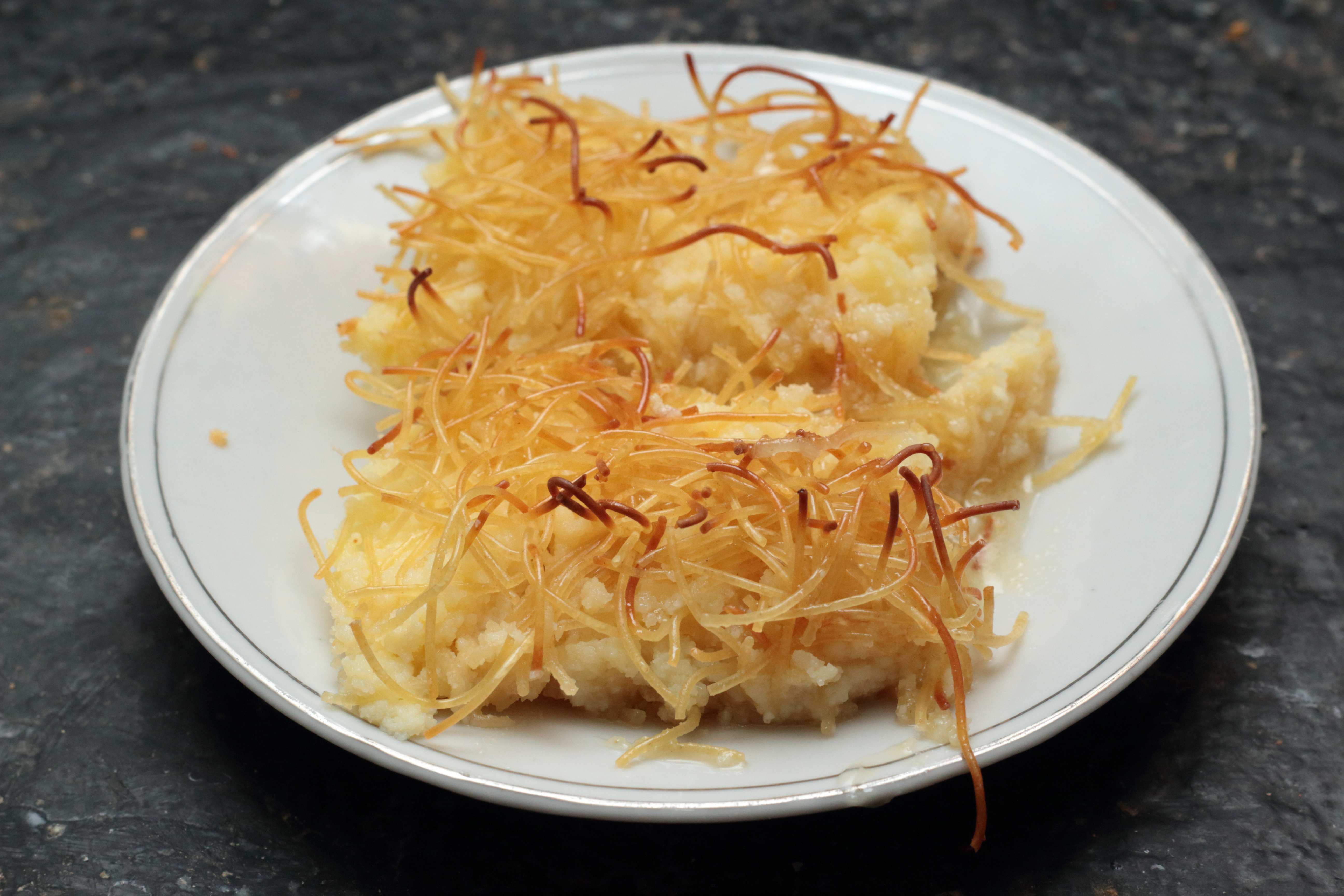 Knafeh hecho en Argentina siguiendo la receta de inmigrantes de Siria